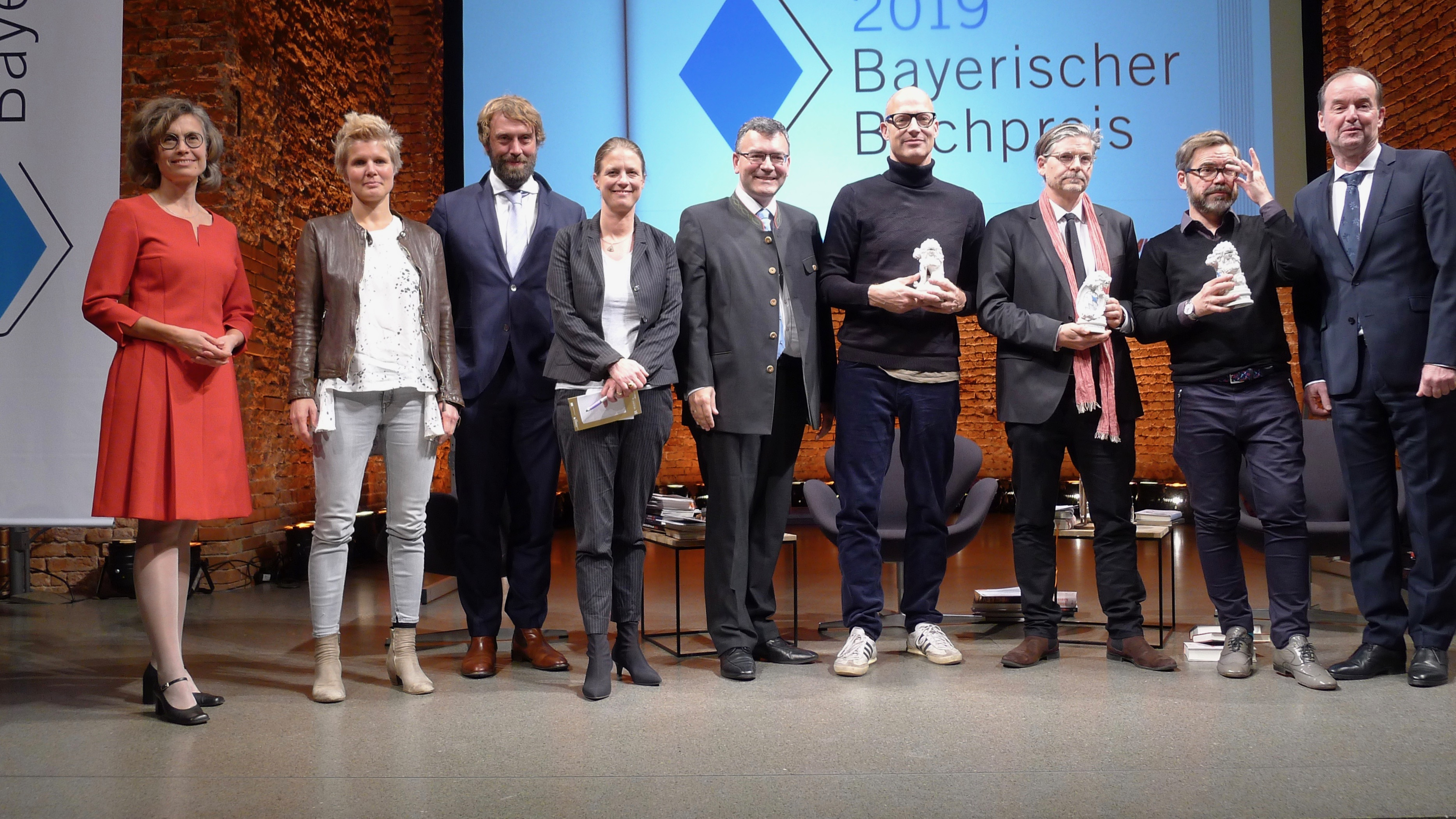 Bayerischer Buchpreis 2019. v. l: Judith Heitkamp (Moderation), Svenja Flasspöhler, Knut Cordsen u. Sandra Kegel (Juroren), Staatsminister Florian Herrmann (Laudator), die Ehrenpreisträger Joachim Meyerhoff, Jan-Werner Müller (Sachbuch) und David Wagner (Belletristik), sowie der Vorsitzende des Börsenvereins des Deutschen Buchhandels - Landesverband Bayern Michael Then.